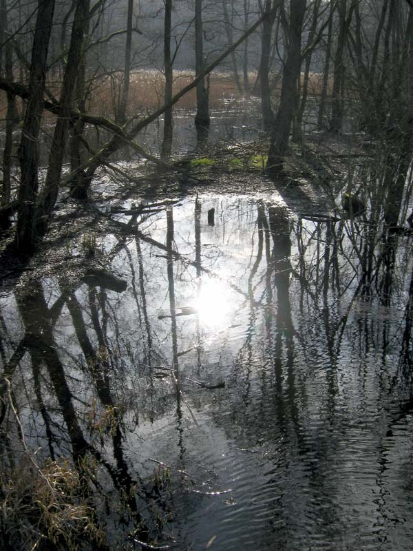 Ragöse an der Unterquerung der B2